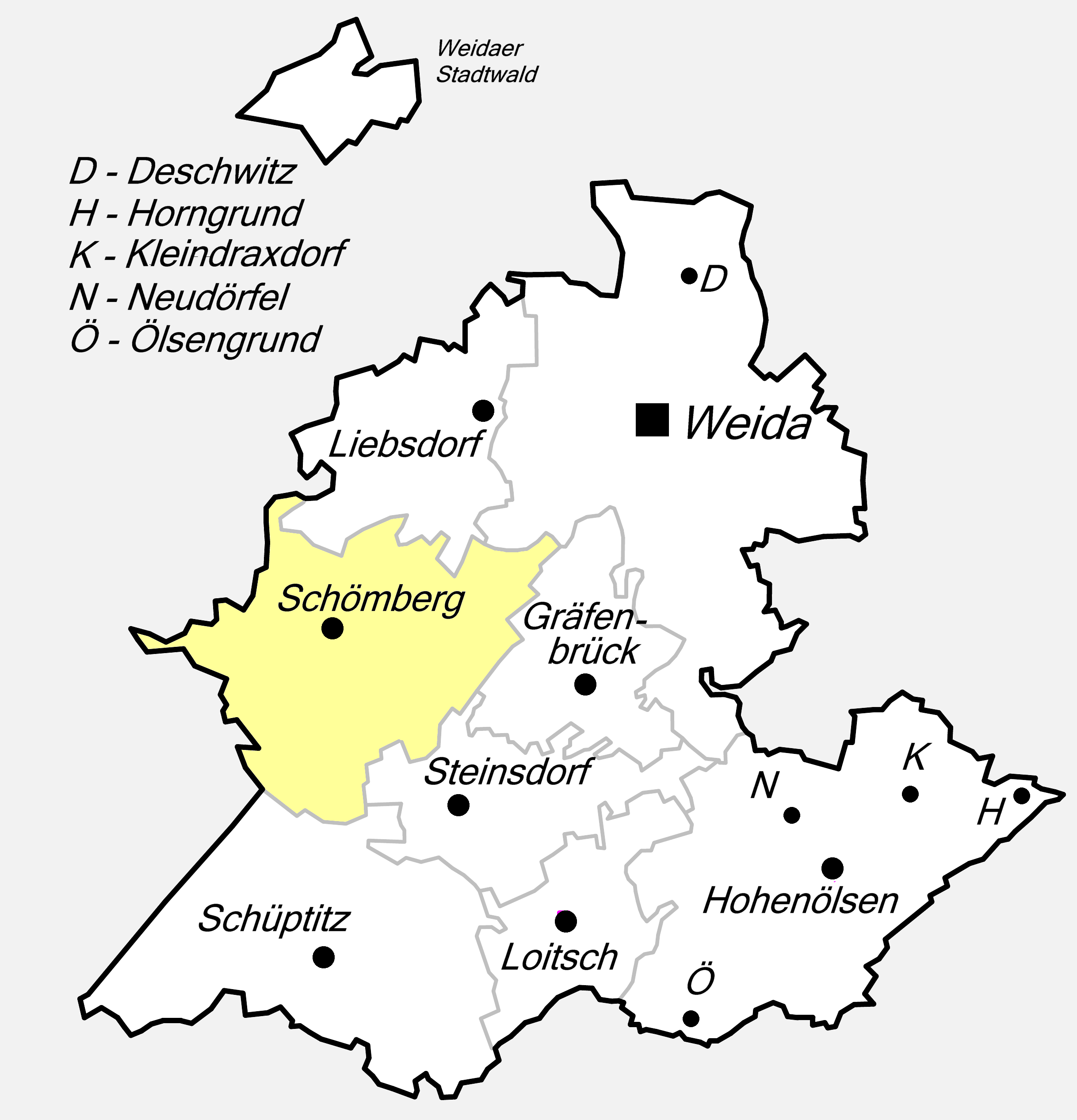 Lagekarte zum Weidaer Stadtteil Schömberg.